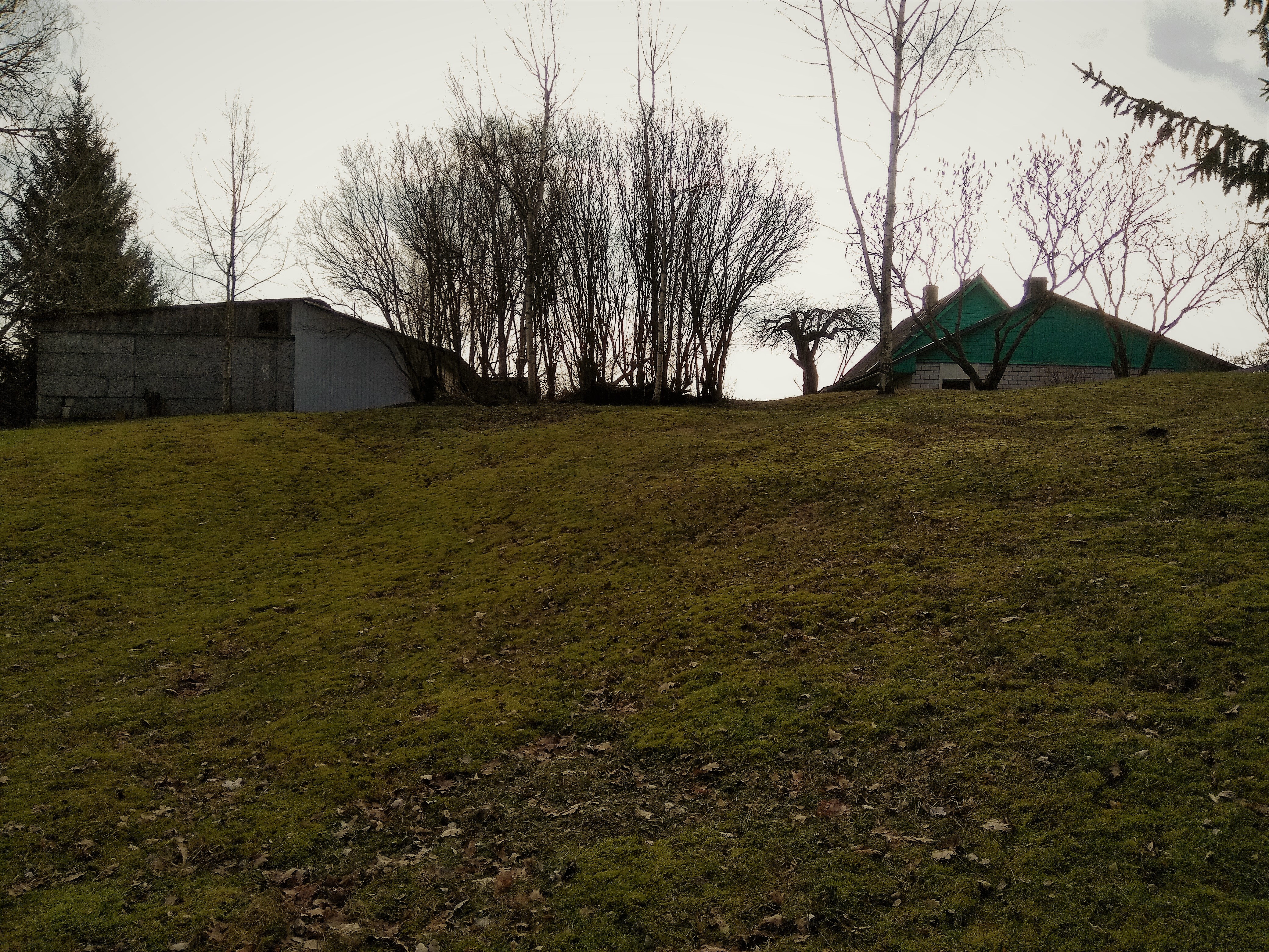 Vaade linnuseala põhjaservast, Utu-Kolga veskipaisjärve kaldalt allesolevale rusukünkale linnuseala kirdenurgas.